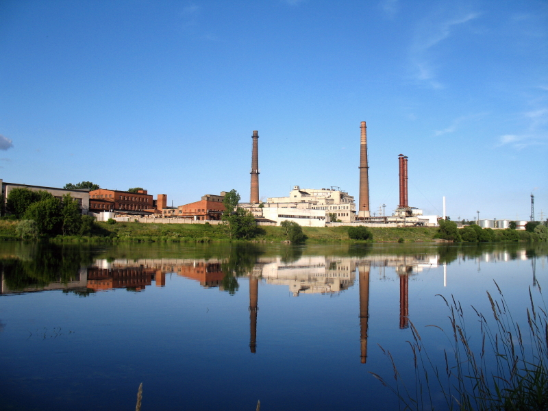 Petrašiūnų šiluminė elektrinė, Kaunas.